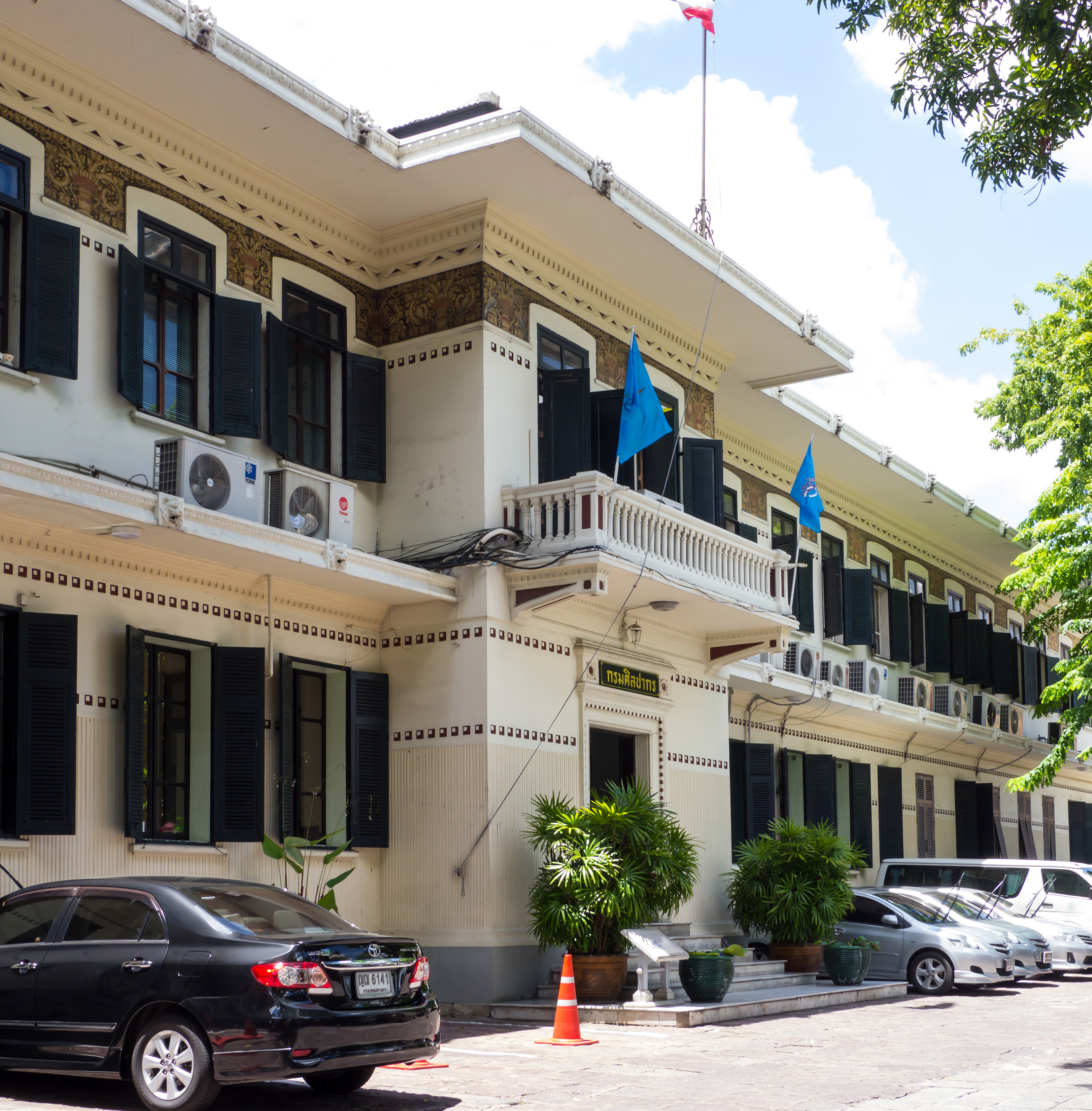 อาคารที่ทำการกรมศิลปากร